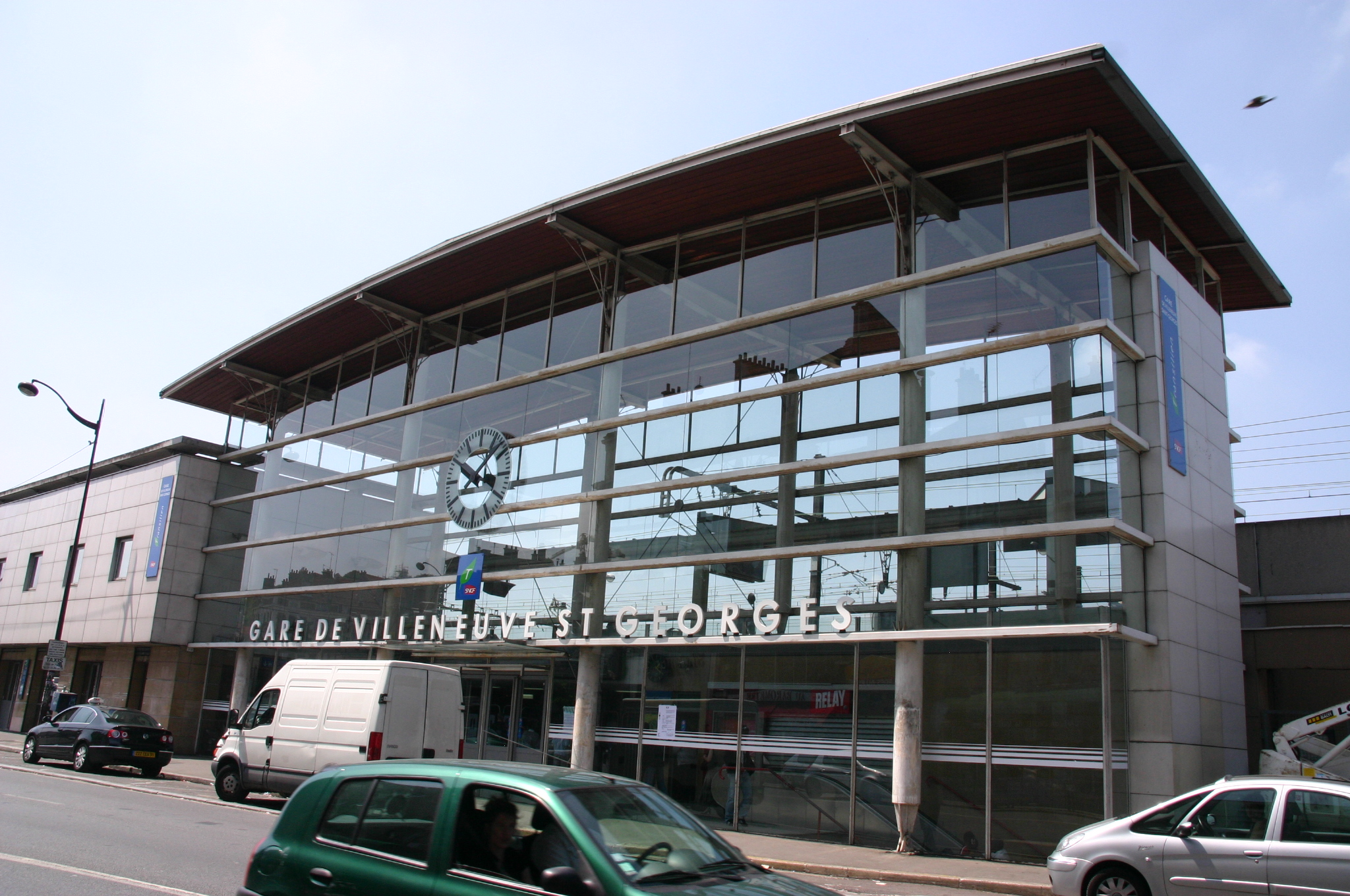 La Gare de Villeneuve-Saint-Georges, Villeneuve-Saint-Georges, département du Val-de-Marne, France